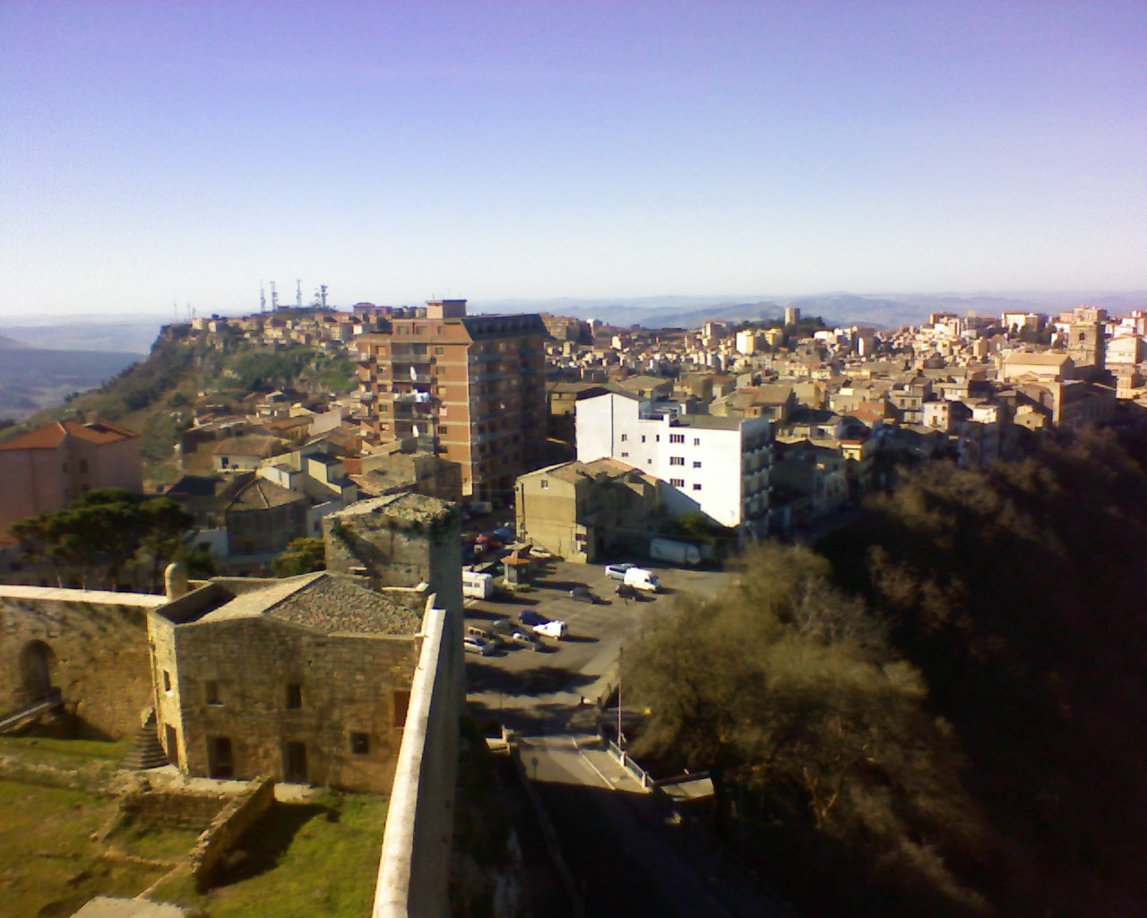 Panorama of Enna seen from the Lombard Castle-Panoramica di Enna vista dal Castello di Lombardia